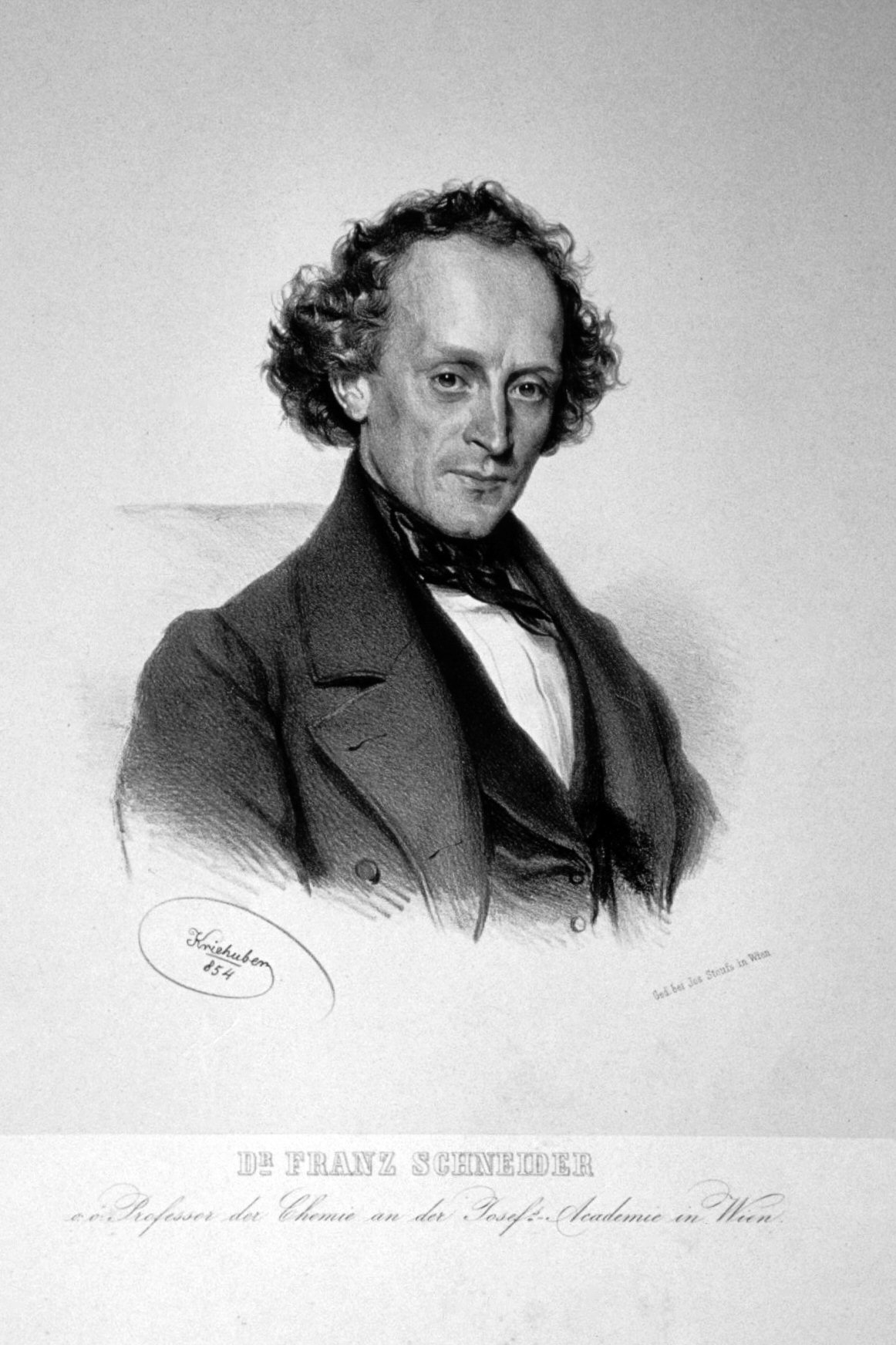 Franz Cölestin Schneider (1813-1897), Dr. med., Chemieprofessor an der Josefs-Akademie, Ministerialrat, Präsident des obersten Sanitätsrates, Mitglied des Herrenhauses, Komtur des FJO. Lithographie von Josef Kriehuber, 1854